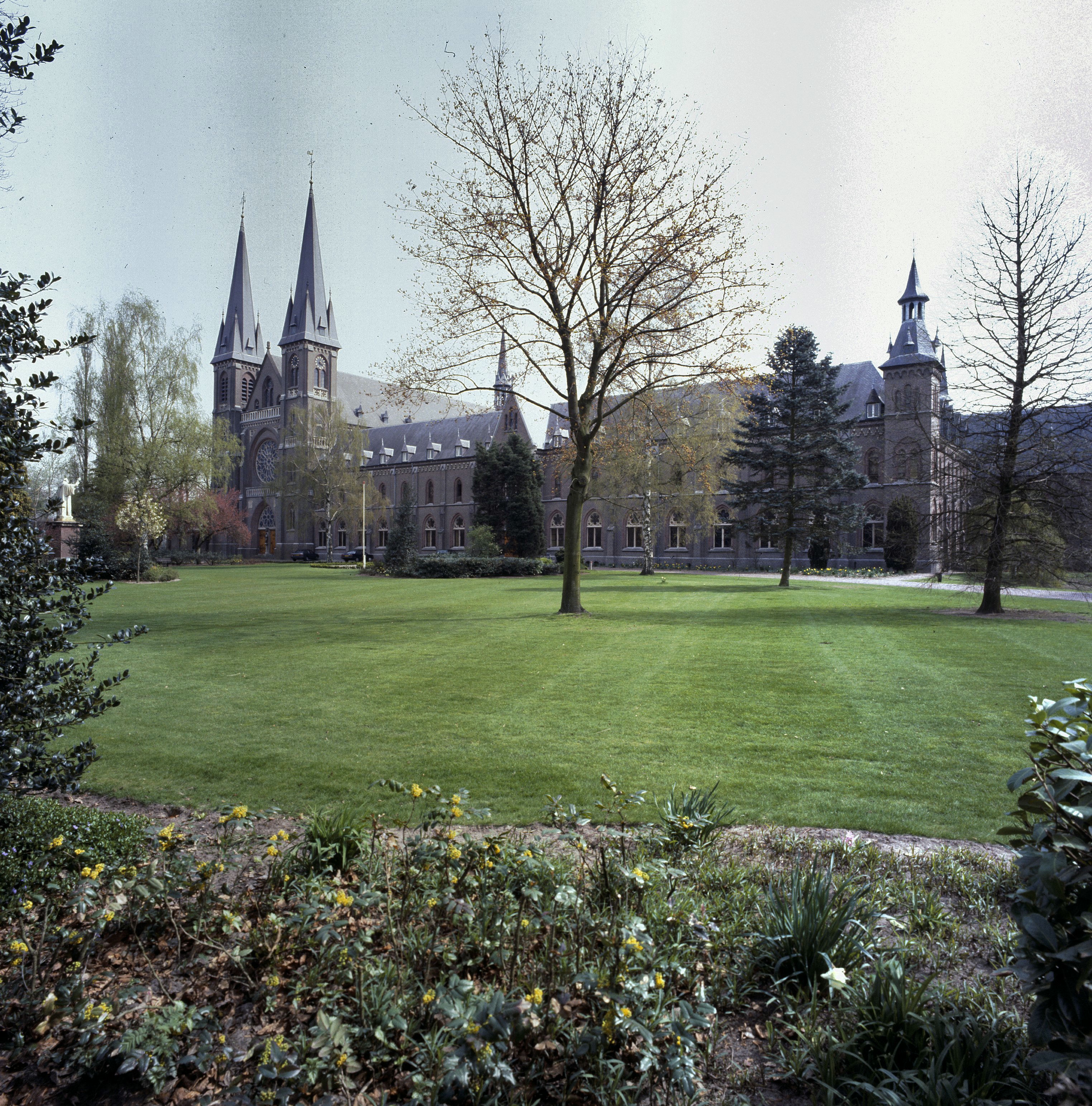 Trappistenklooster: Overzicht met westgevel abdijkerk met kerktorens (opmerking: Gefotografeerd voor Monumenten In Nederland Noord-Brabant)